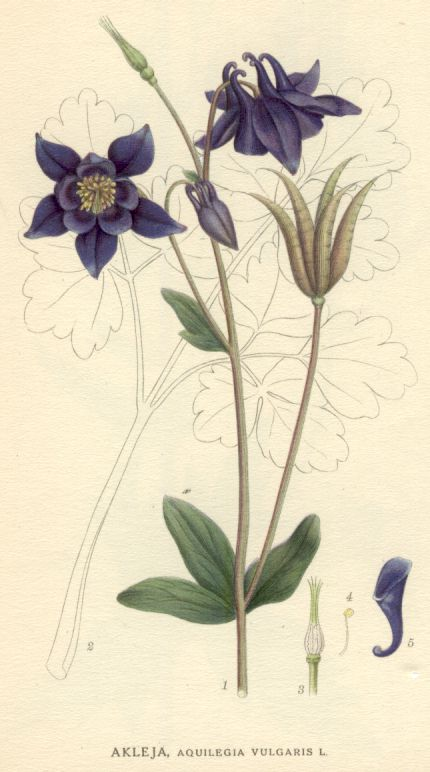 Aquilegia vulgaris